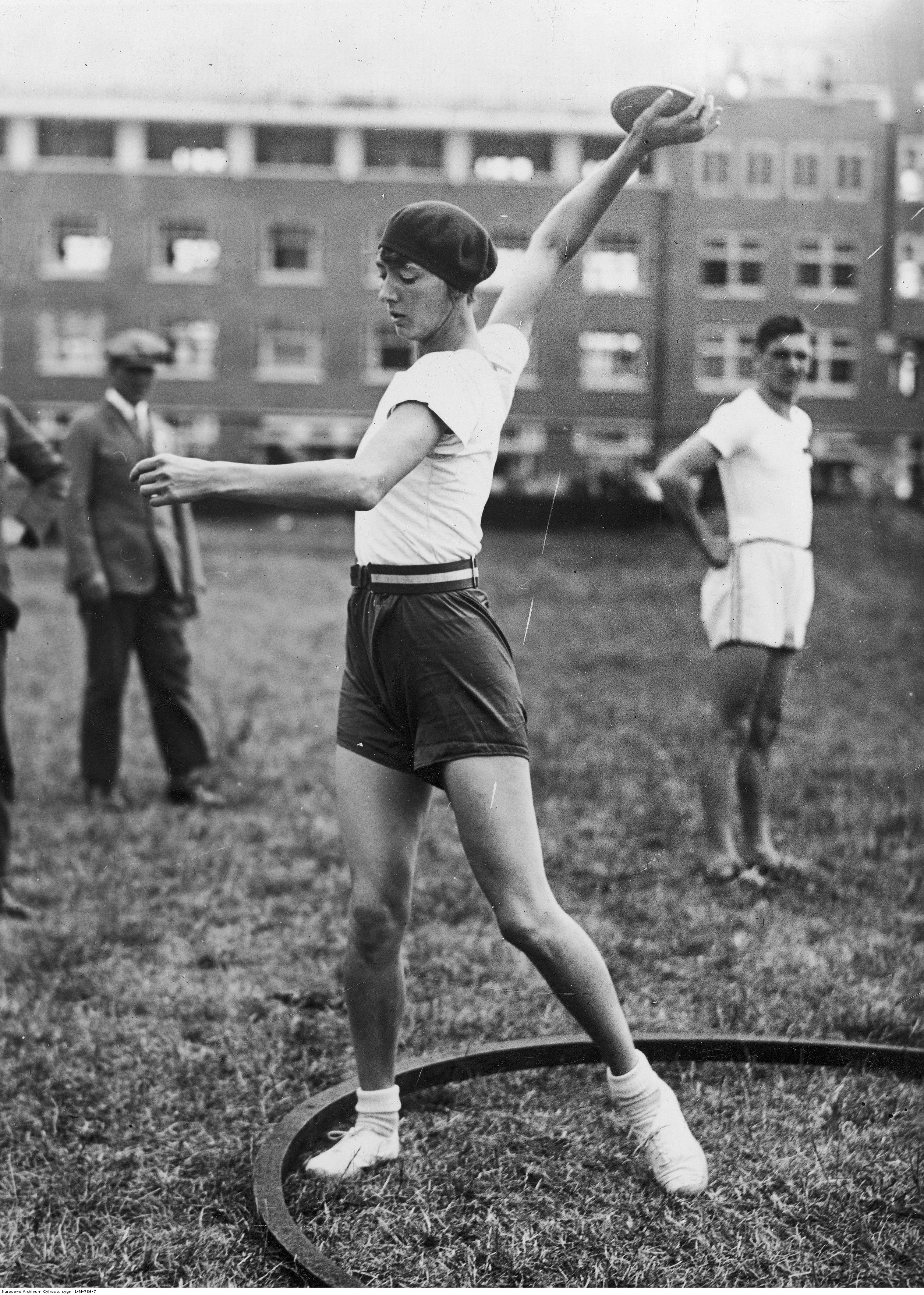 Konkurencje lekkoatletyczne - rzut dyskiem. Widoczna polska lekkoatletka Halina Konopacka.